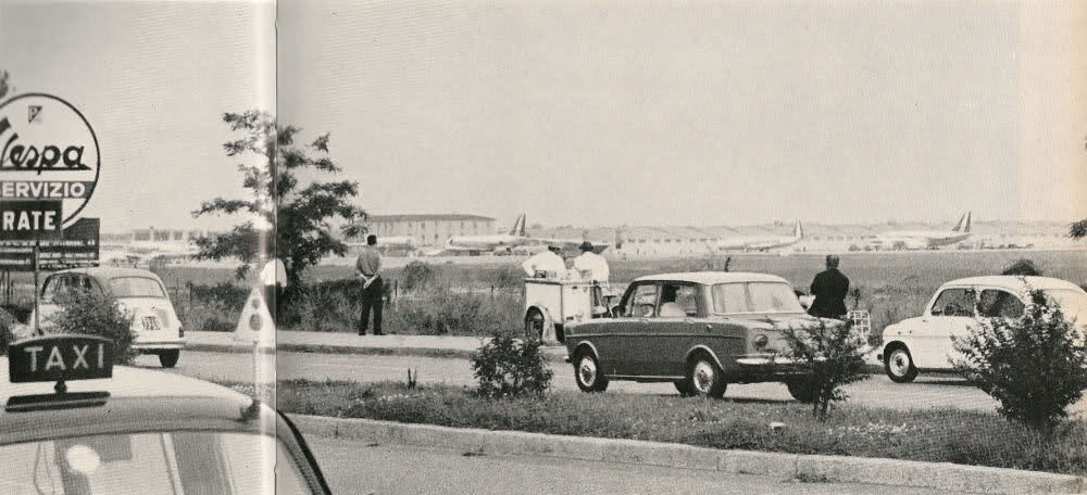 Milano, viale Forlanini. Curioso il carretto dei gelati per coloro che guardano gli aerei decollare!